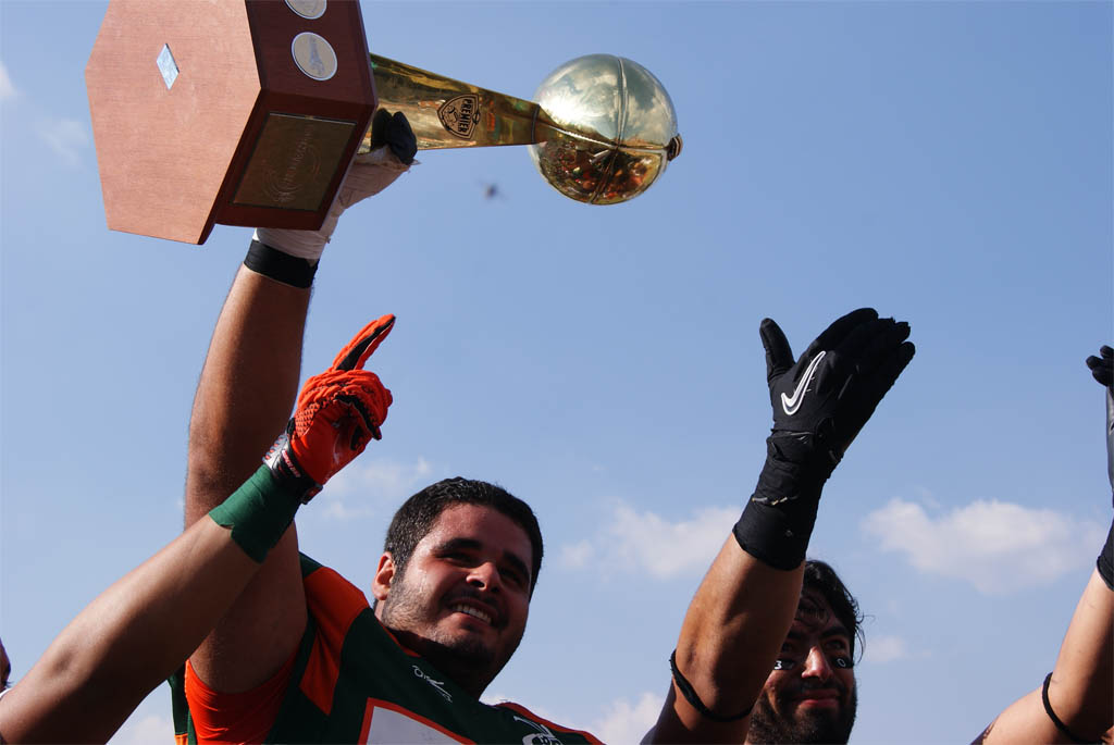 Aztecas UDLAP campeón de la Liga Premier de fútbol americano de CONADEIP.